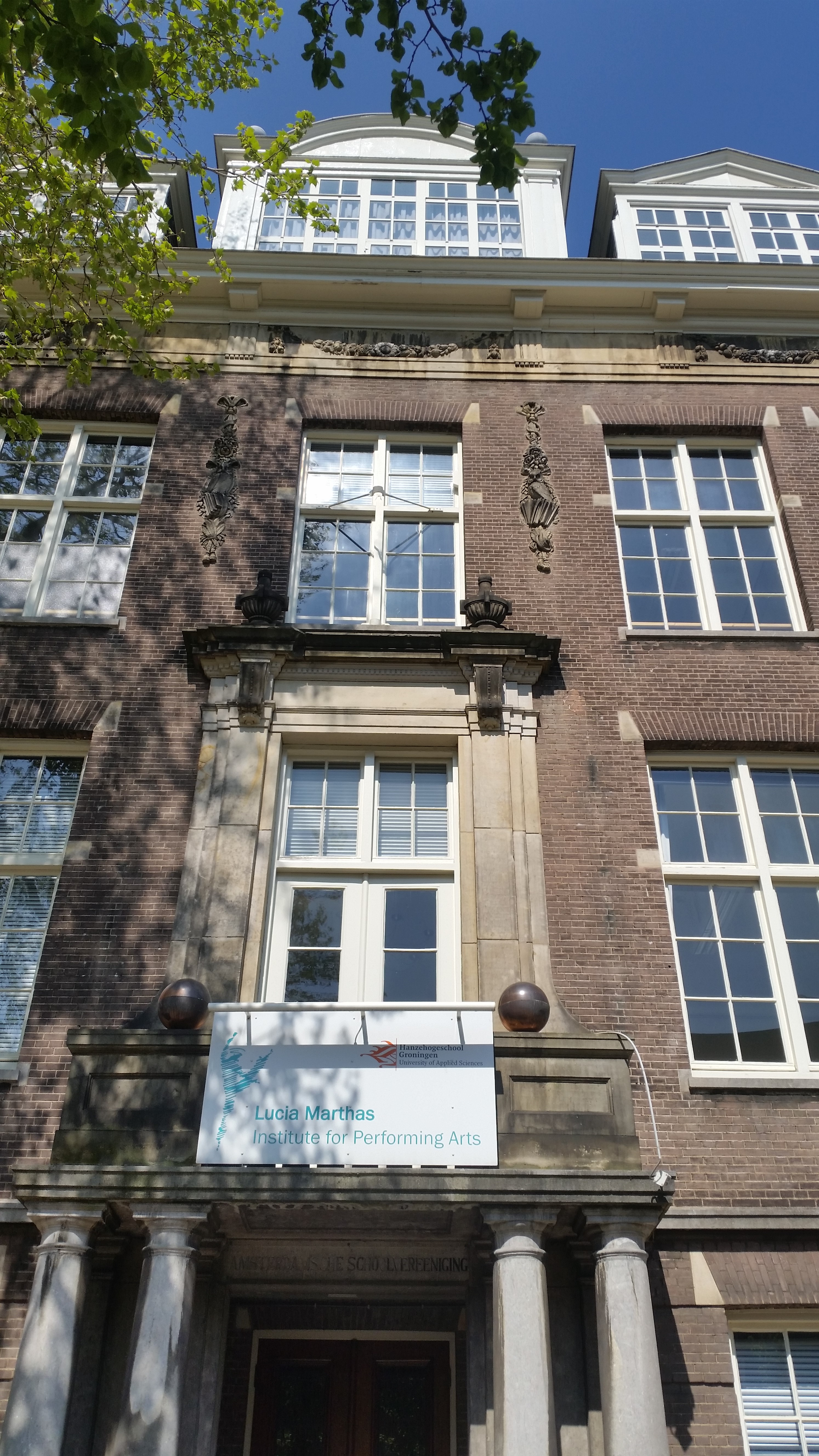 Impressie van Gabriël Metsustraat 7, Amsterdam-Zuid